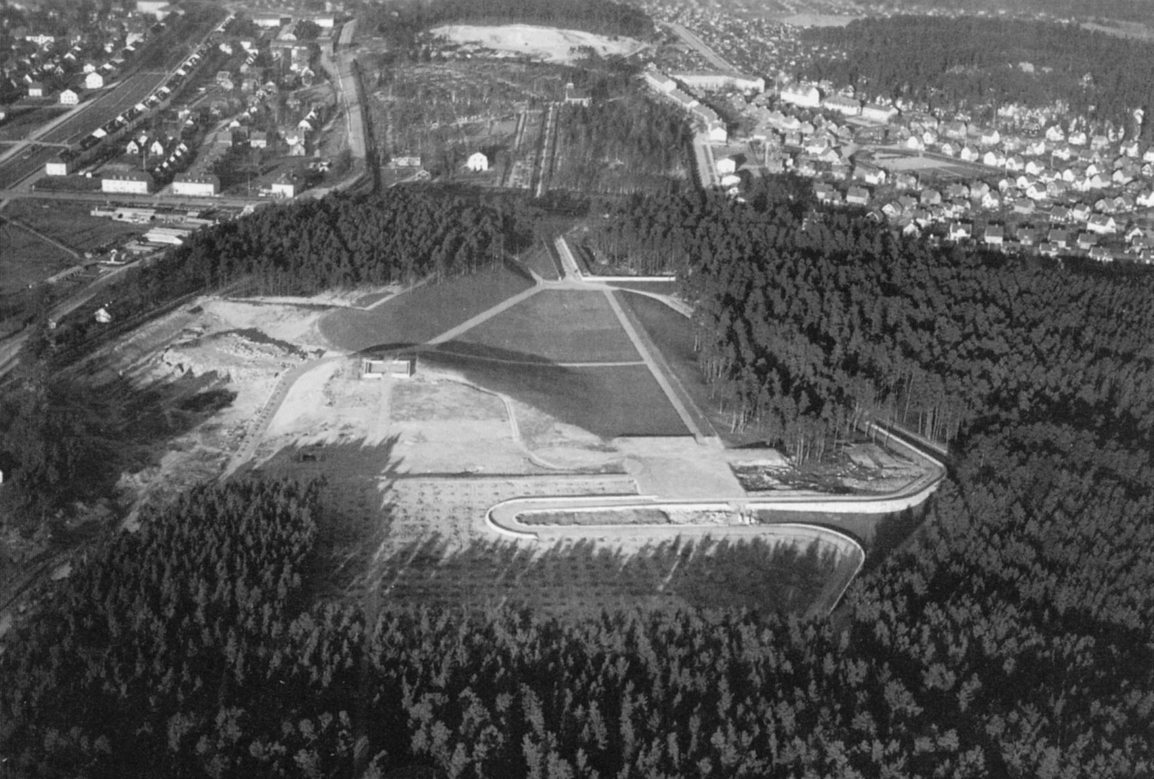 Skogskyrkogården i Stockholm på 1930-talet, vy mot norr